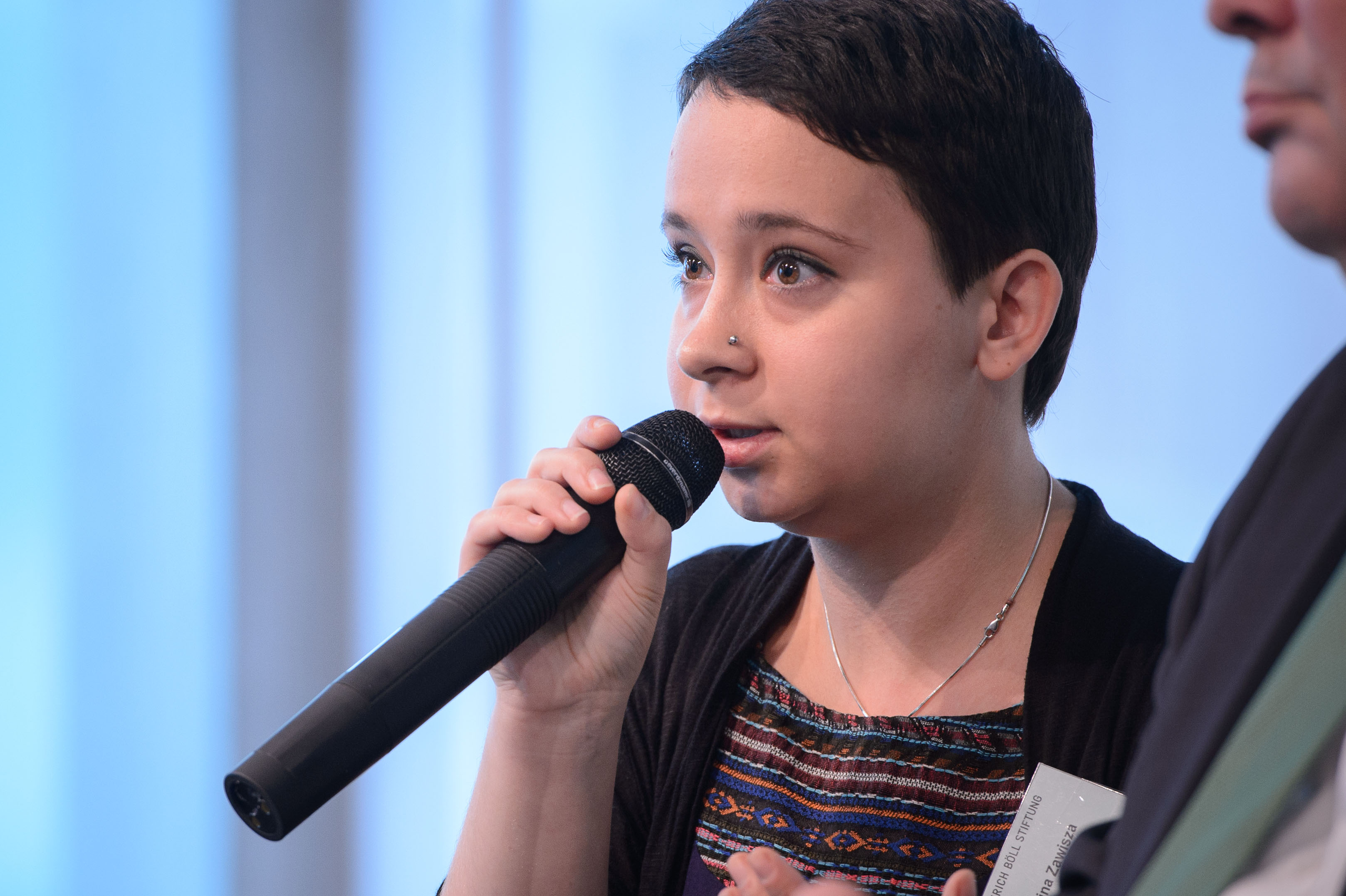 Marcelina Zawisza (Journalistin und Aktivistin, Warschau)